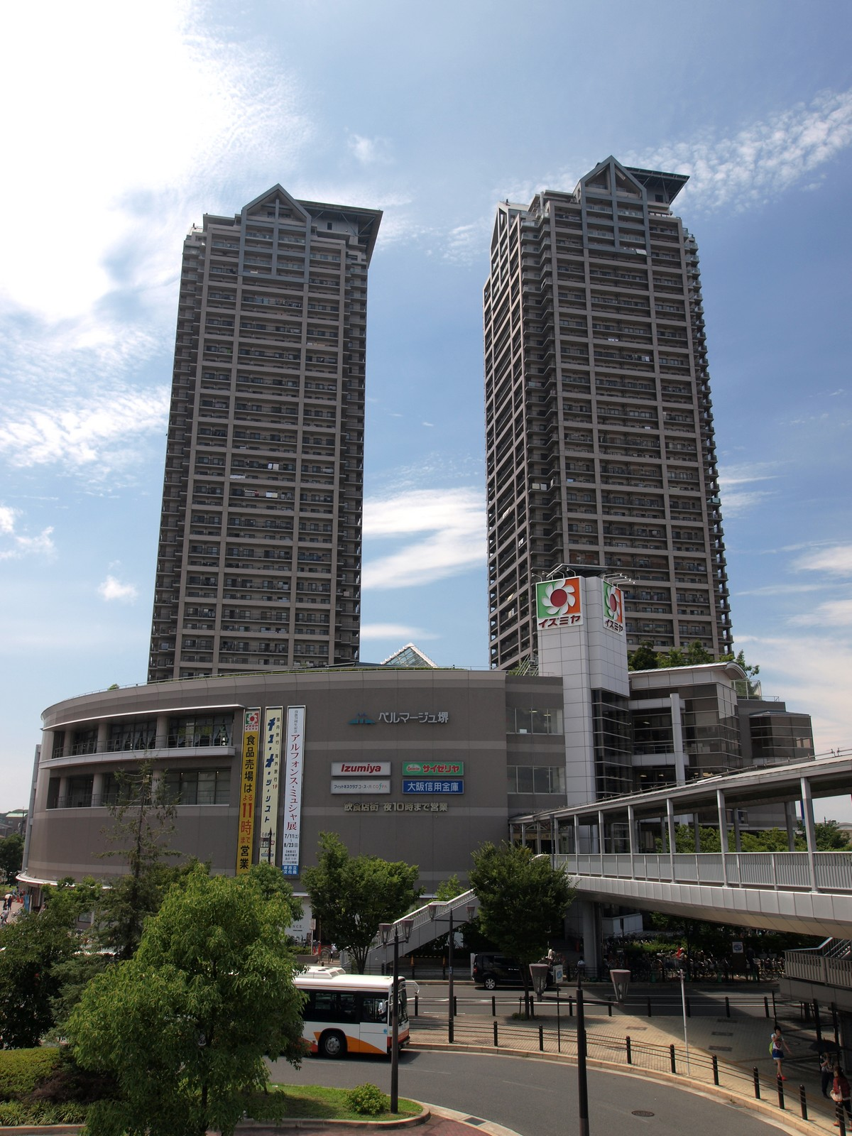 ベルマージュ堺所在地：大阪府堺市堺区田出井町1番